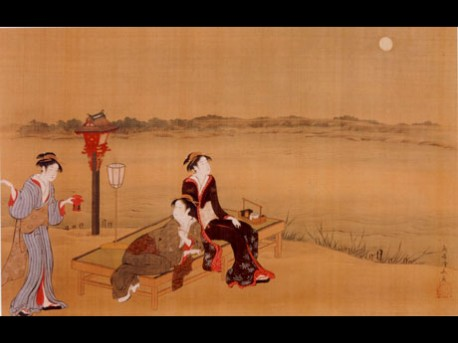 Ukuiyo-e